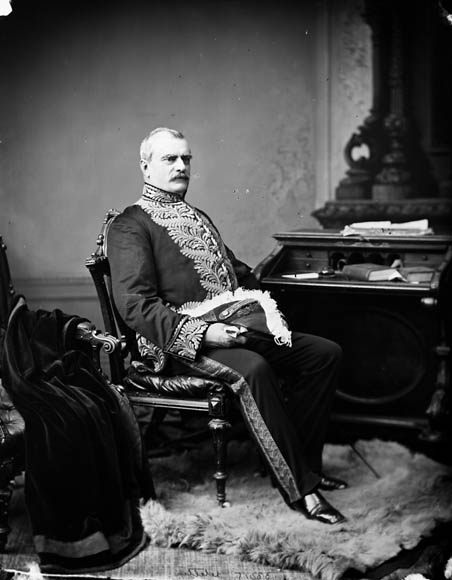 Luc Letellier de Saint-Just, lieutenant-gouverneur du Québec